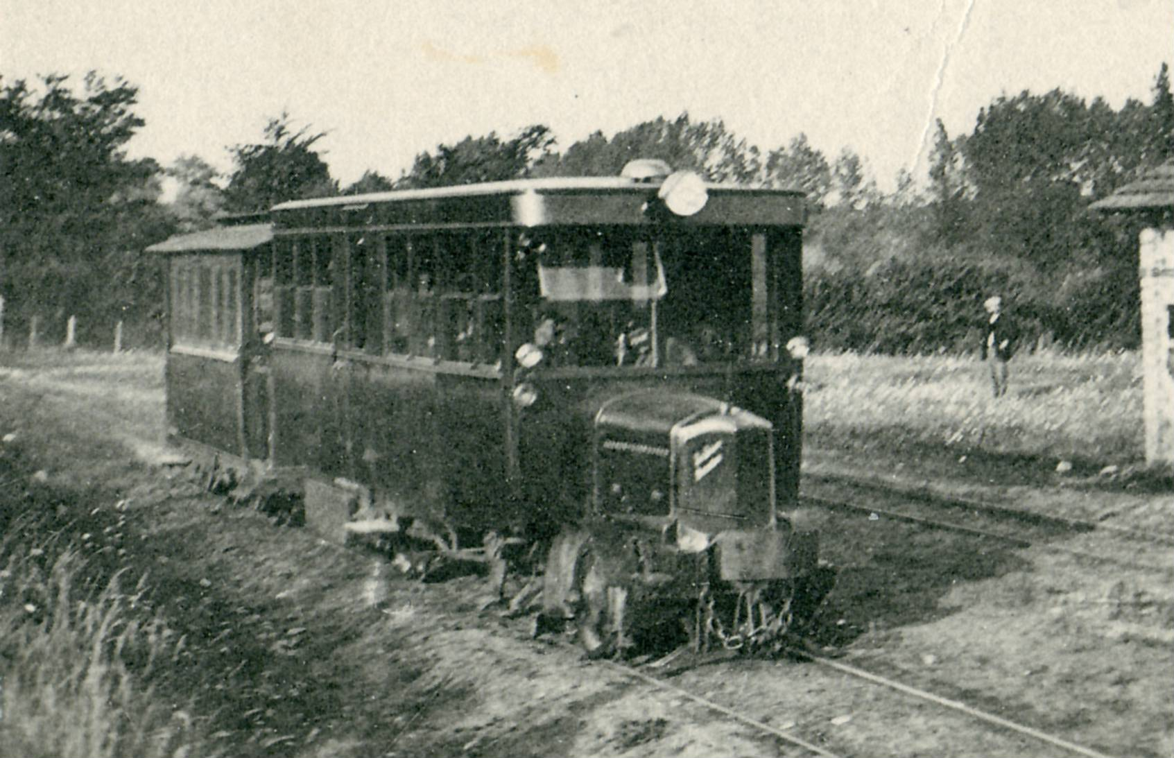 Détail de la carte postale, sans mention d'éditeur, n°6THELIGNY (Sarthe) - La gare du TramwayIl s'agit d'une automotrice De Dion-Bouton type JM, carrossée par Carel et Fouché, livrée en 1924 (automotrice B201) ou 1925 (automotrice B202) aux Tramways de la Sarthe